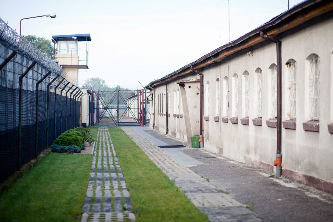 Zakład Karny Stargard, budynek więzienny.